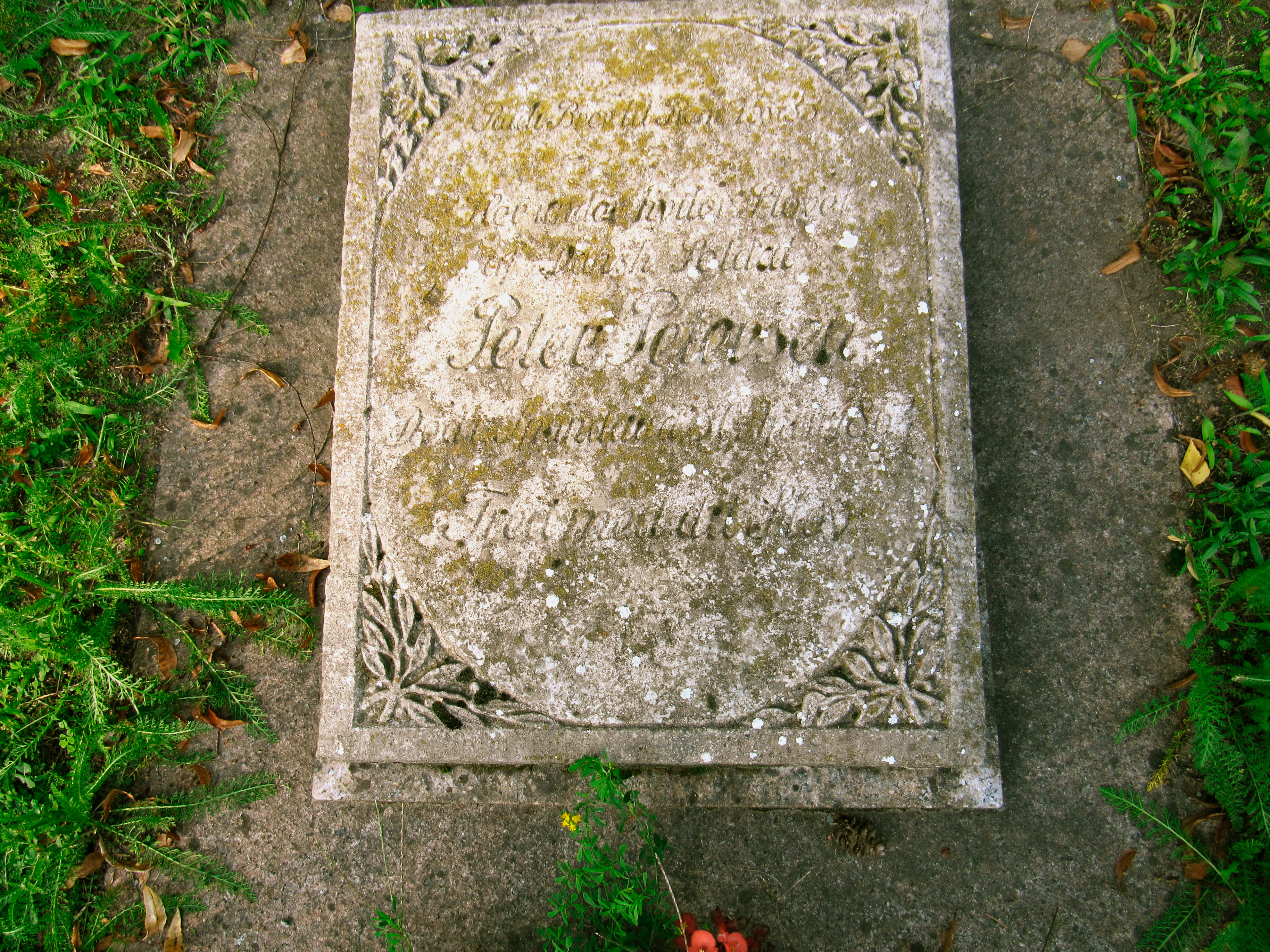 Gedenkstein Peter Petersen Friedhof In den Kisseln Spandau